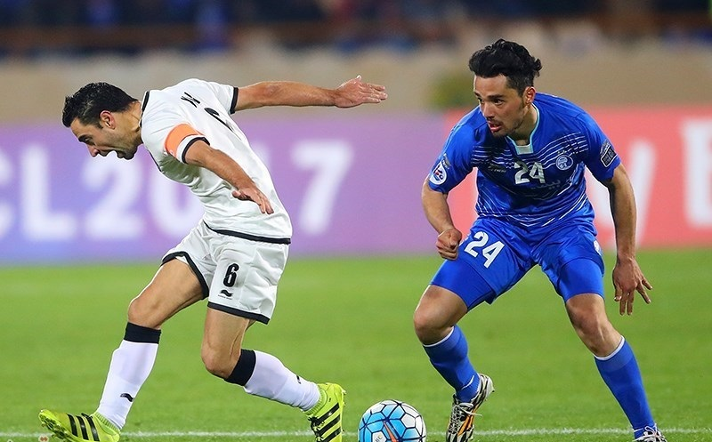 دیدار تیم های فوتبال استقلال و السد قطر